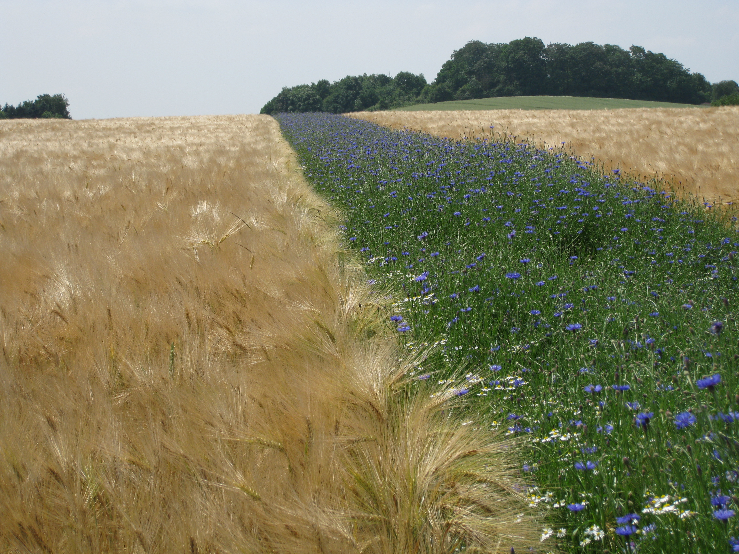 Feldversuch am Mechtenberg im Vorfeld der RUHR.2010, als „Farbachse“ im Rahmen des Projekts „Zwei Berge – eine Kulturlandschaft“ angelegter Blühstreifen mit Kornblumendominanz (Centaurea cyanus) im Getreidefeld